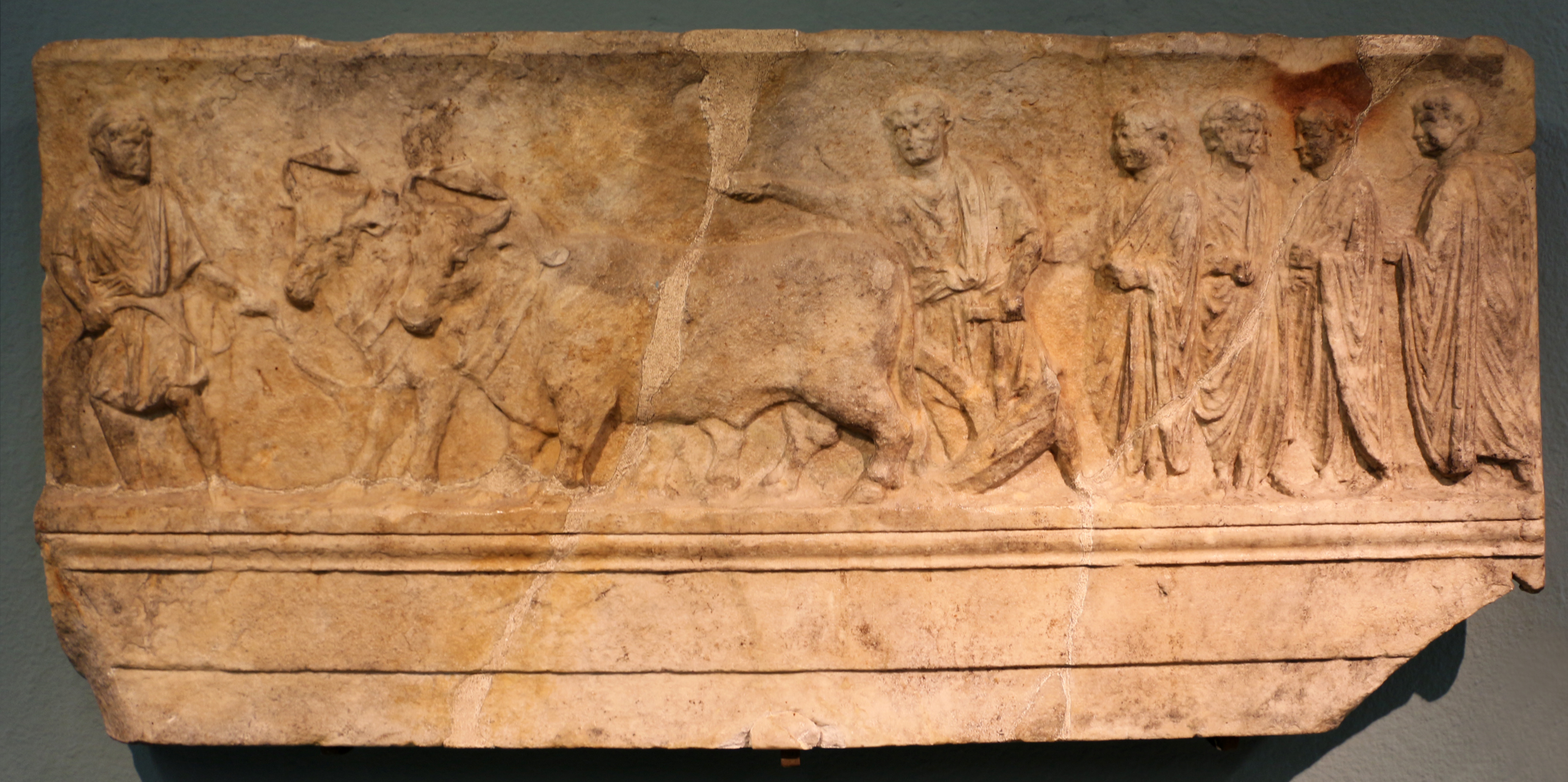 Museo Archeologico Nazionale di Aquileia This is a photo of a monument which is part of cultural heritage of Italy.